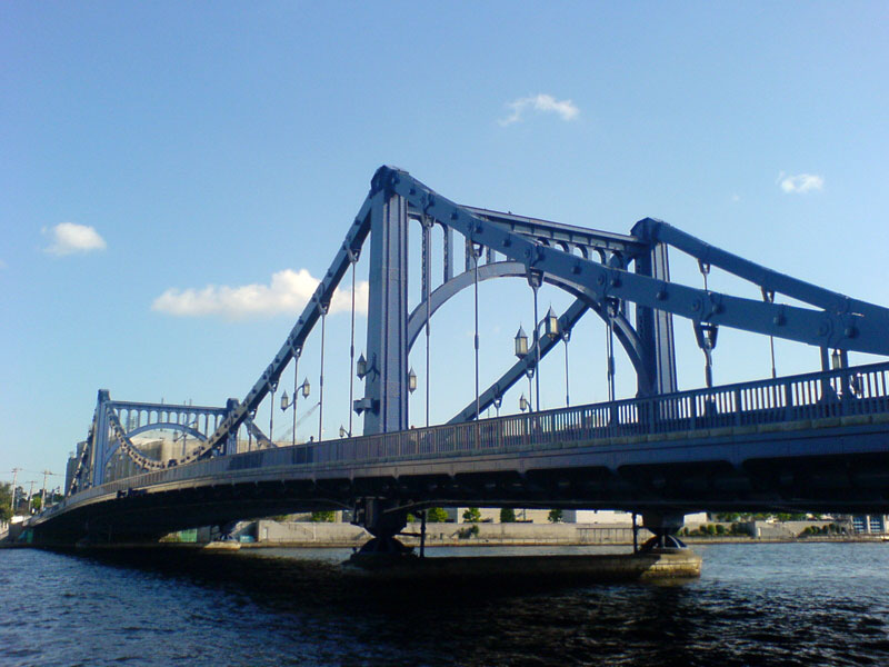 撮影位置 隅田川にかかる清洲橋を、中央区側から撮影した。 撮影日 2005年9月29日 撮影者 jmho（投稿者と同じ） 撮影機材 ソニーエリクソン製携帯電話 W31S 画像形式 JPEG形式 横800×縦600ピクセル。色数24bit。